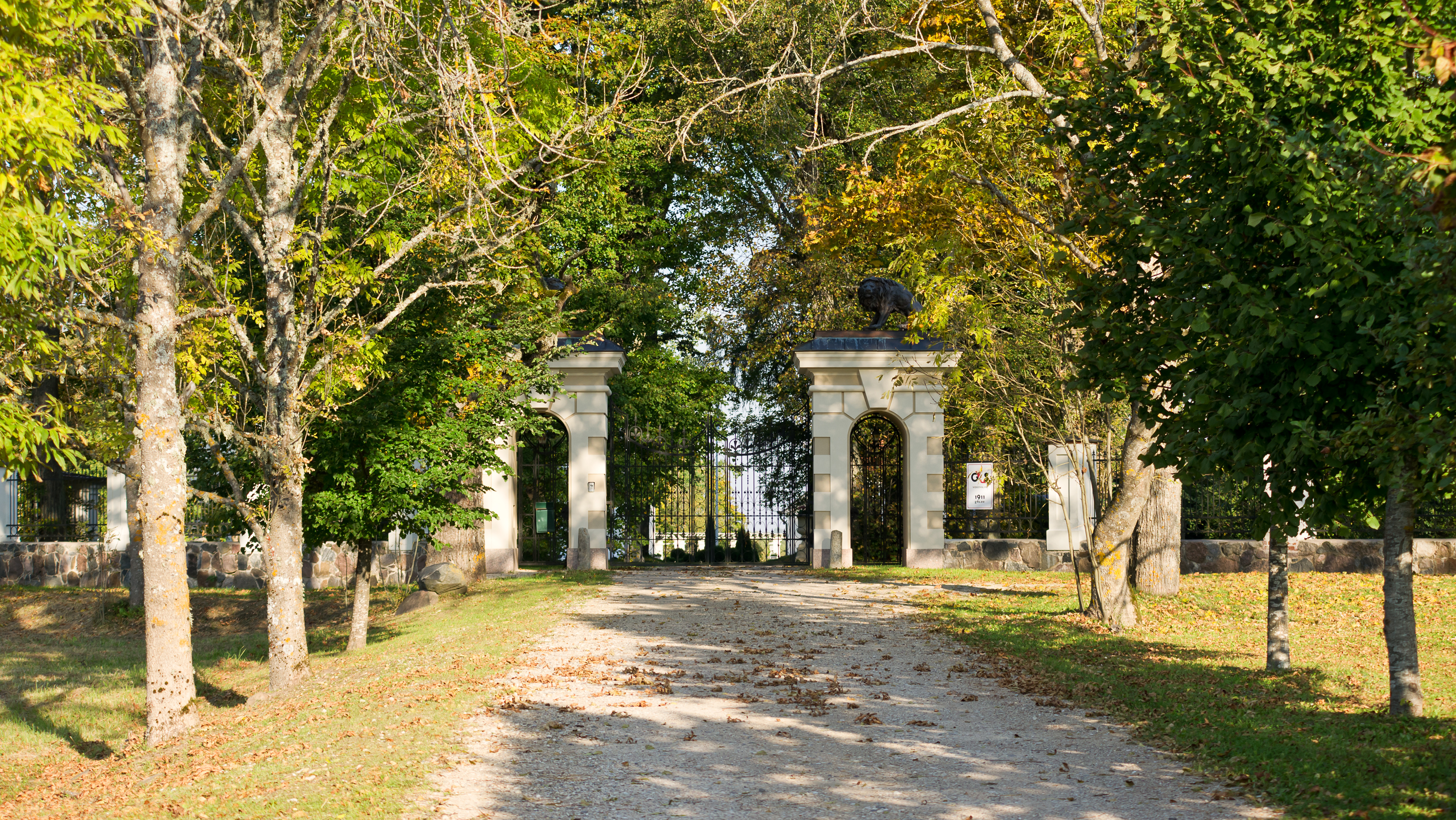 Mäksa mõis, väravad